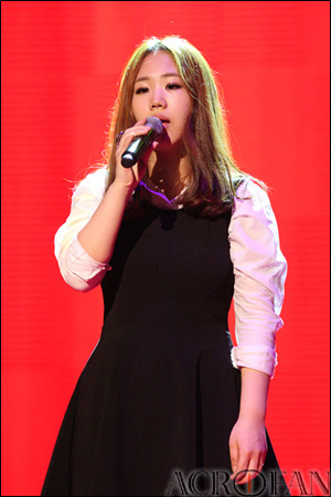 엠넷 보이스코리아 4월 20일 합격자 서면인터뷰